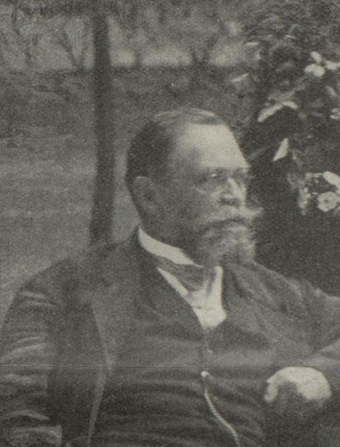 Porträtfoto von Georg Büttner